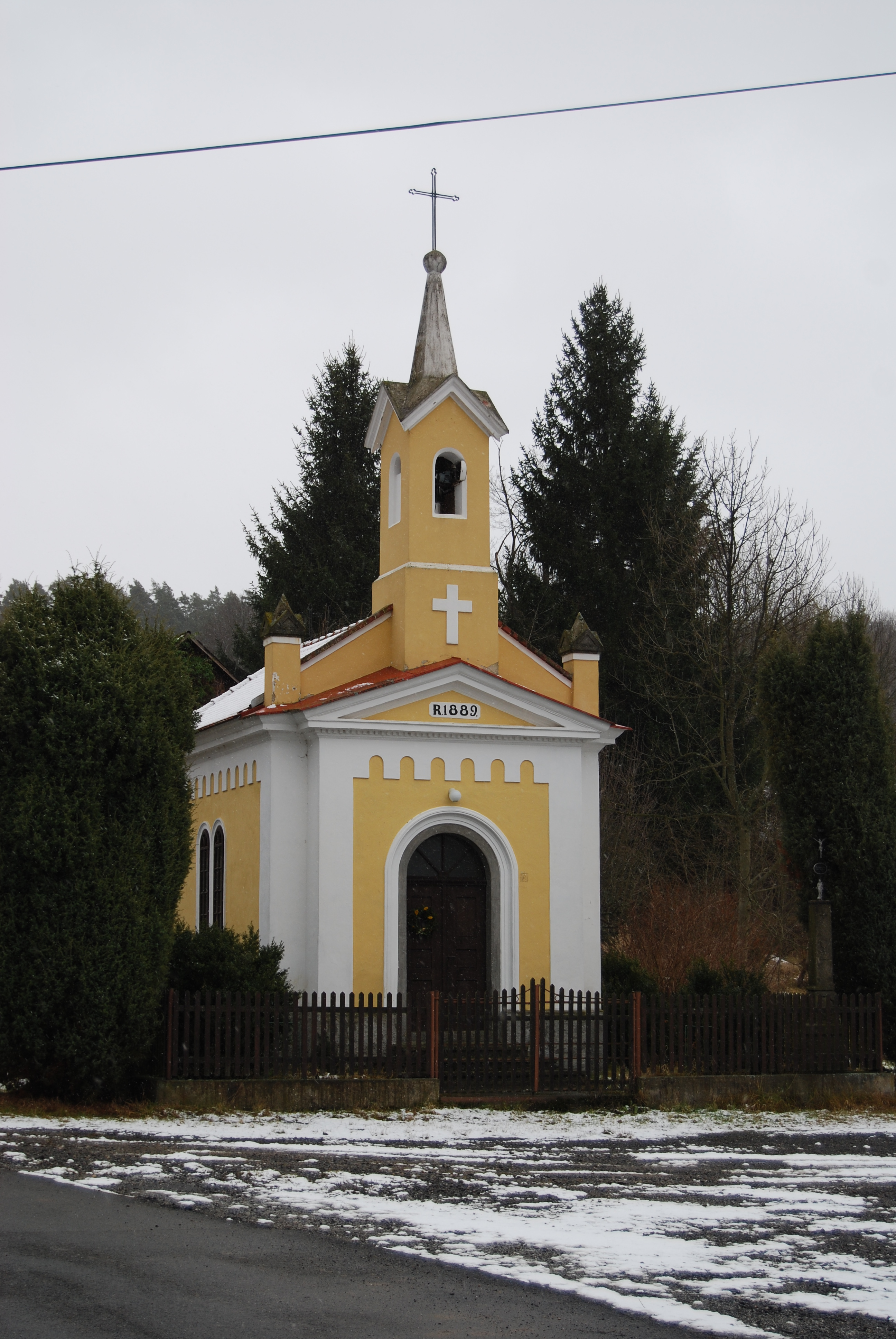 Kaple v obci z roku 1889. Porešín je malá vesnice, část obce Petrovice v okrese Příbram. Česká republika.